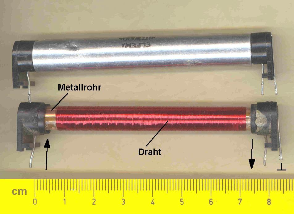 Elektrische Verzögerungsleitung aus Farbfernseher, tv = 450ns, Impedanz 1kOhm, VEB ELFEMA Mittweida, ca. 1980 andere Versionen: VZL64weg.jpg - Ultraschall-Verzögerungsleitung